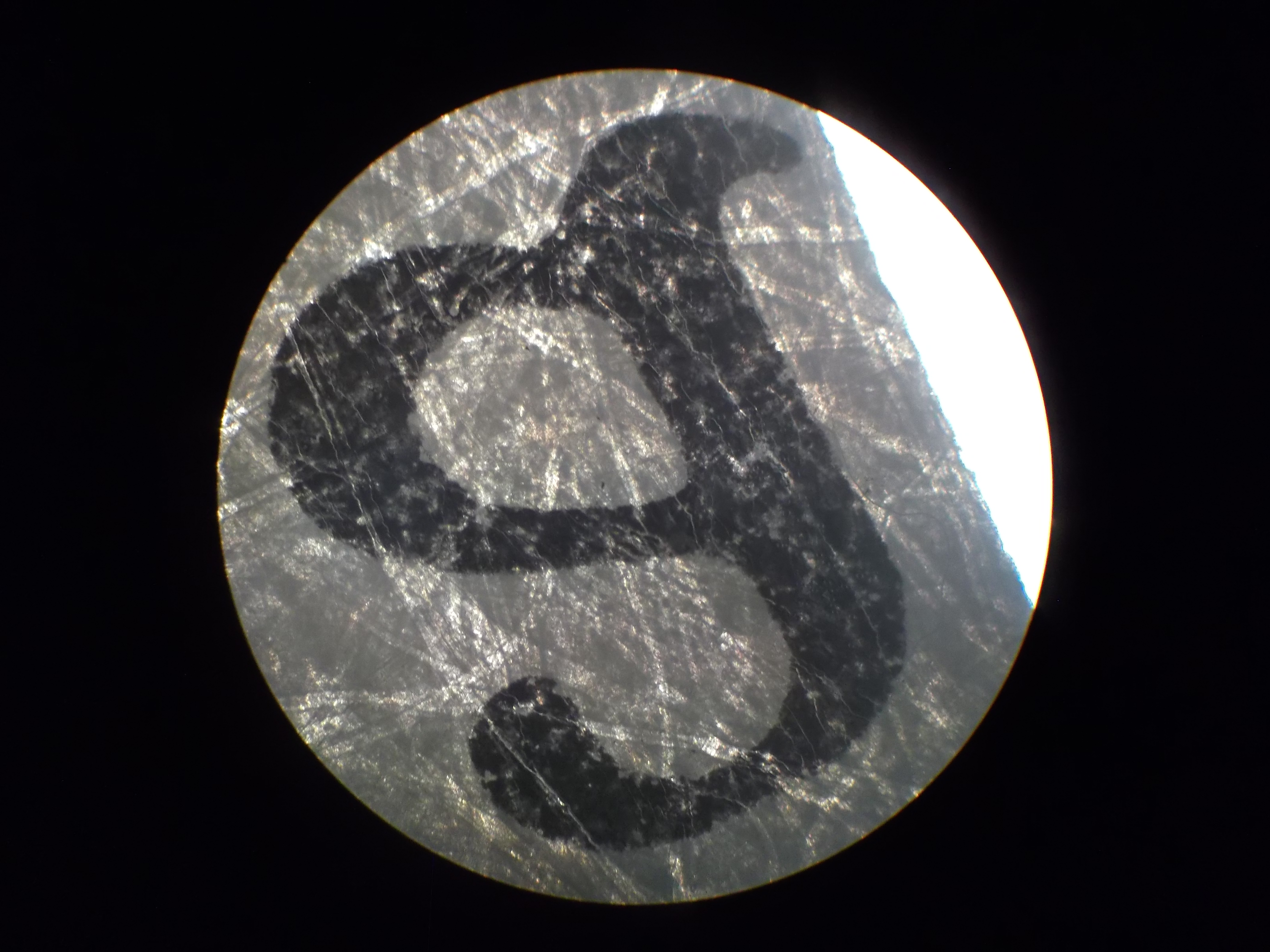 Widok litery "a" pod mikroskopem. English | polski | +/−